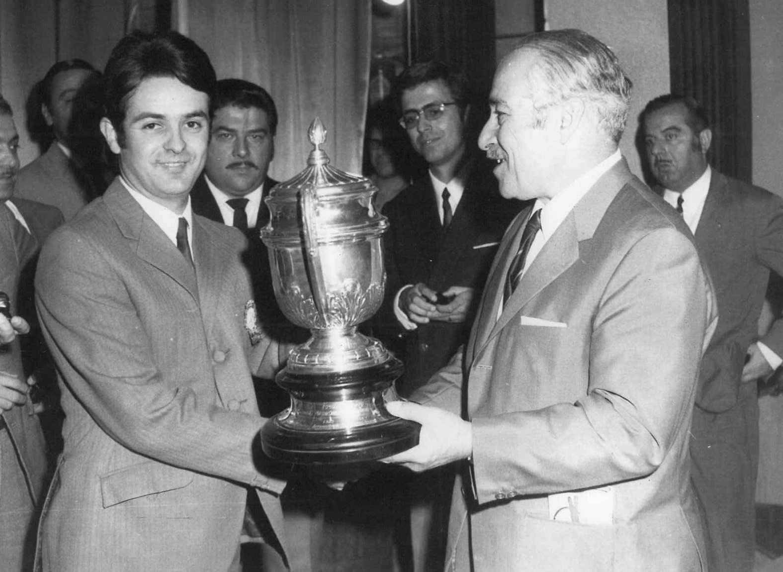 Pepito Rabasa (dreta) lliurant el Trofeu Derbi a Jordi Barbany el 1969, amb motiu de la seva segona victòria consecutiva a la Volta. La banda argentada del peu de la copa recull el nom dels 18 vencedors anteriors de la cursa.